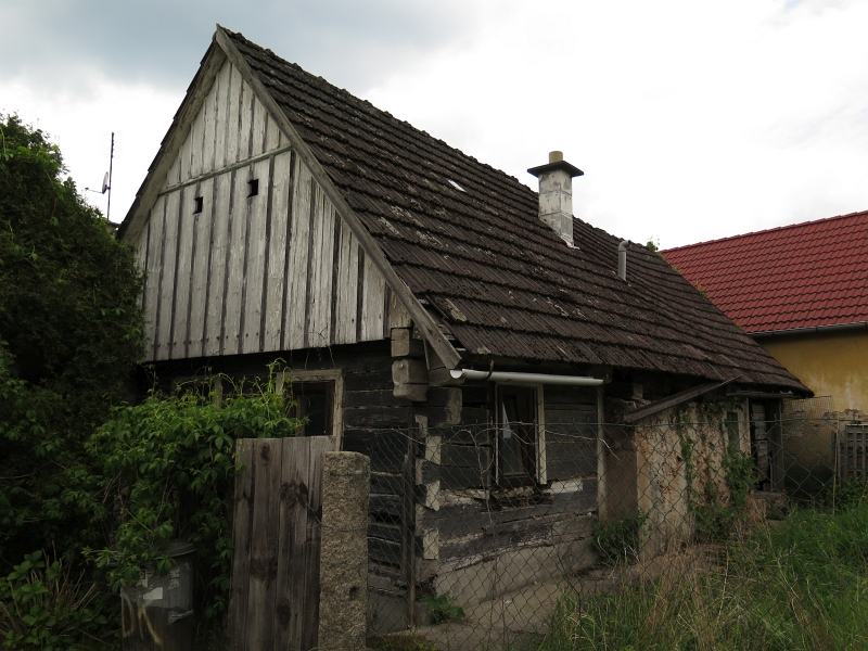 Usedlost čp. 9, Hamr 9, Hamr (okres Jindřichův Hradec).